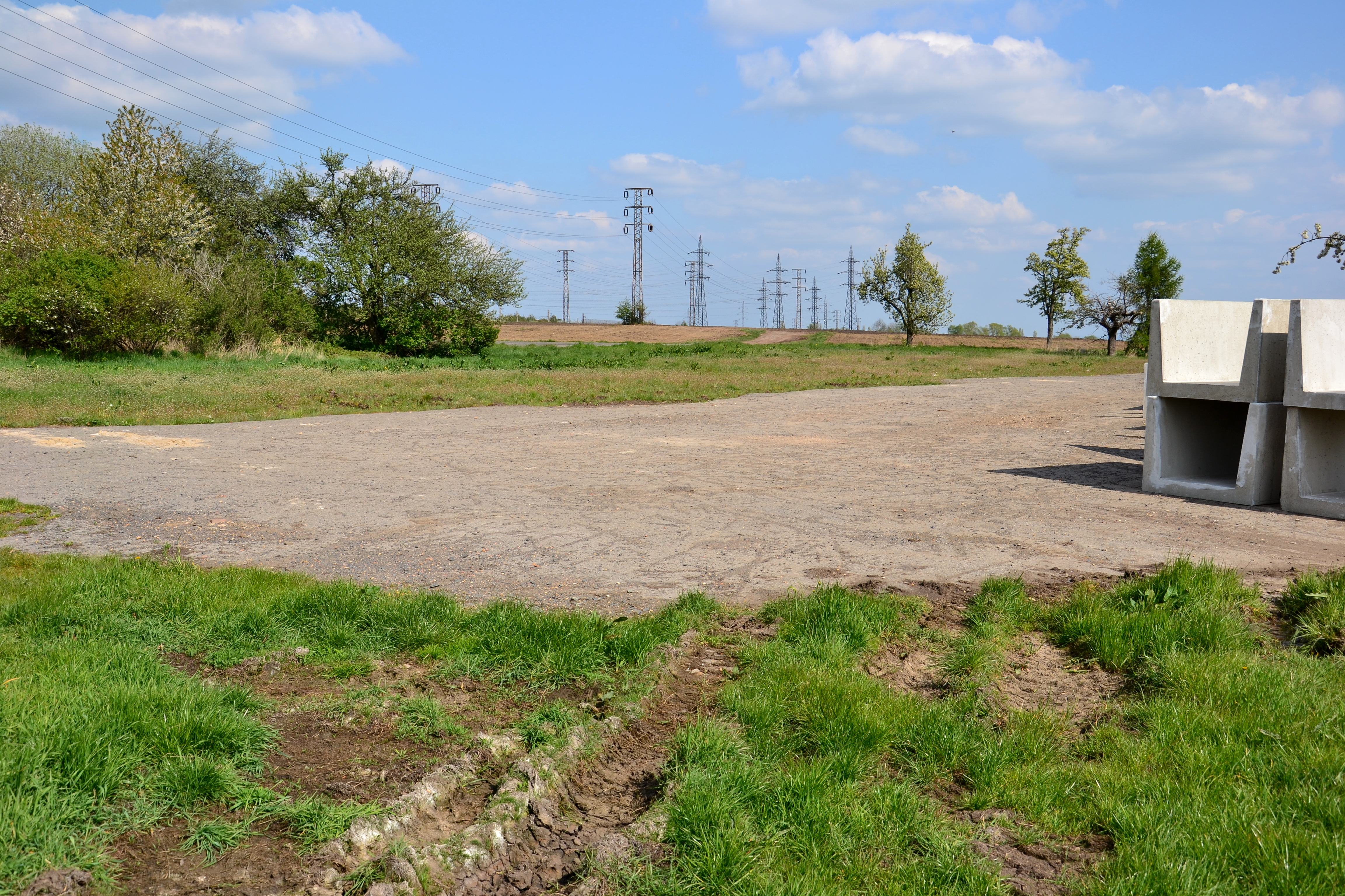 Místo, kde stávala vesnice Zásada